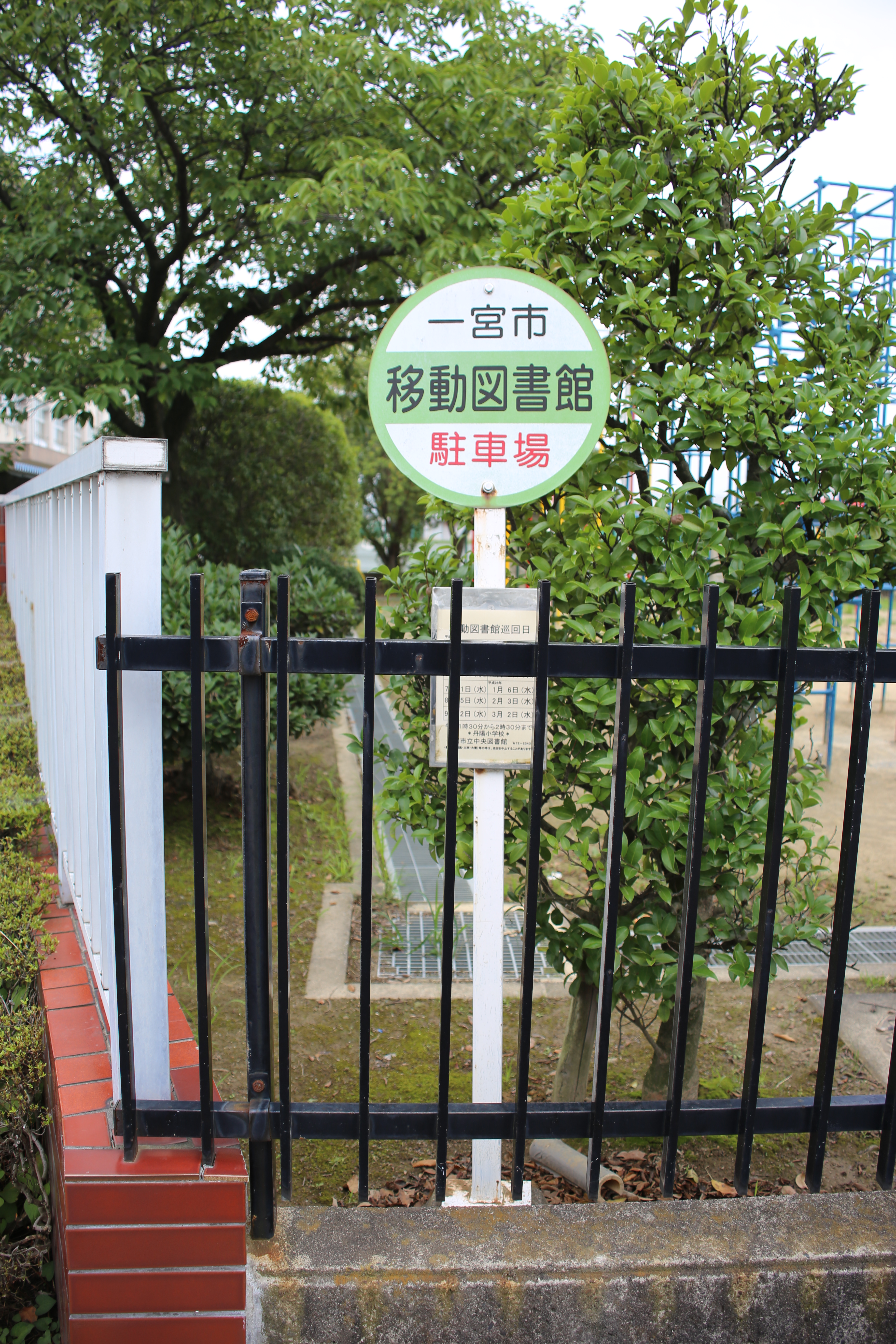 愛知県一宮市の一宮市立丹陽小学校に設置されている一宮市立図書館 移動図書館の駐車場を示す標柱